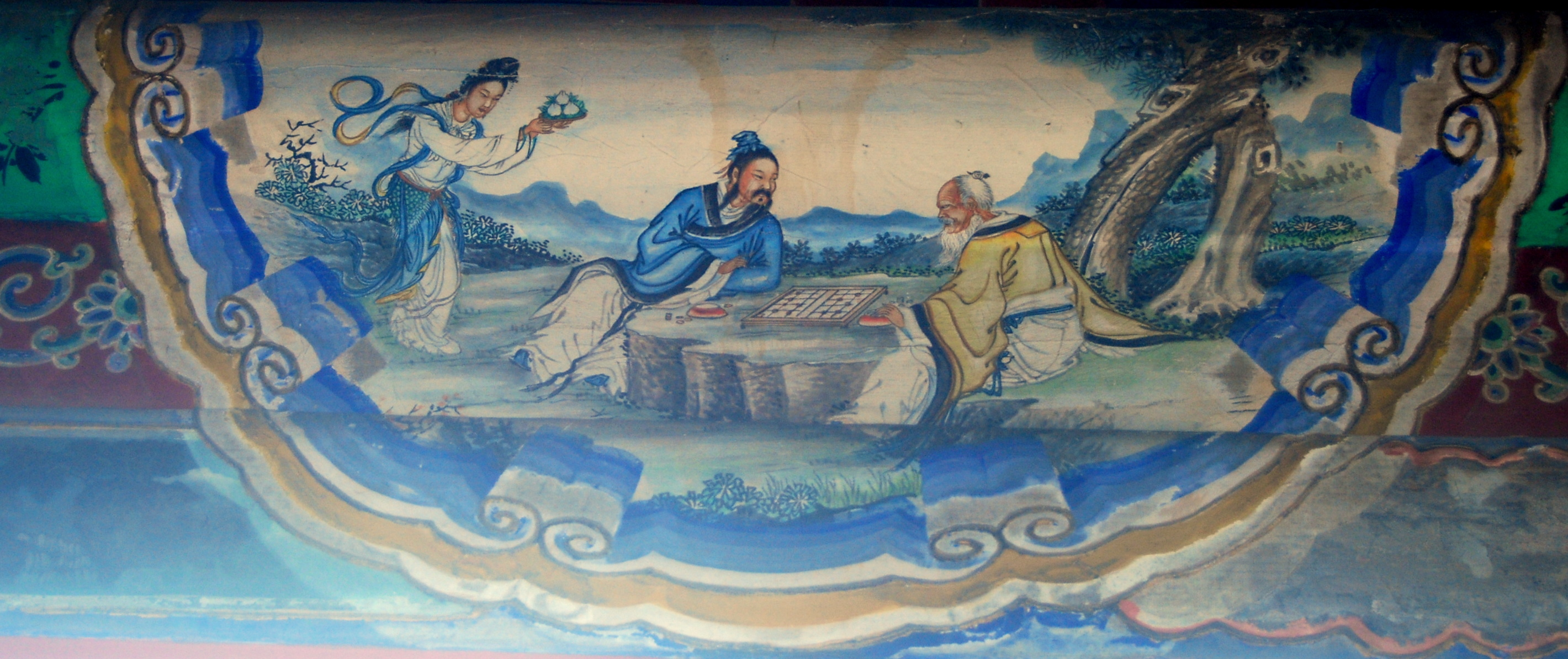 颐和园长廊上的彩绘：麻姑献寿